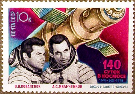 Космонавты СССР Ковалёнок и Иванченков